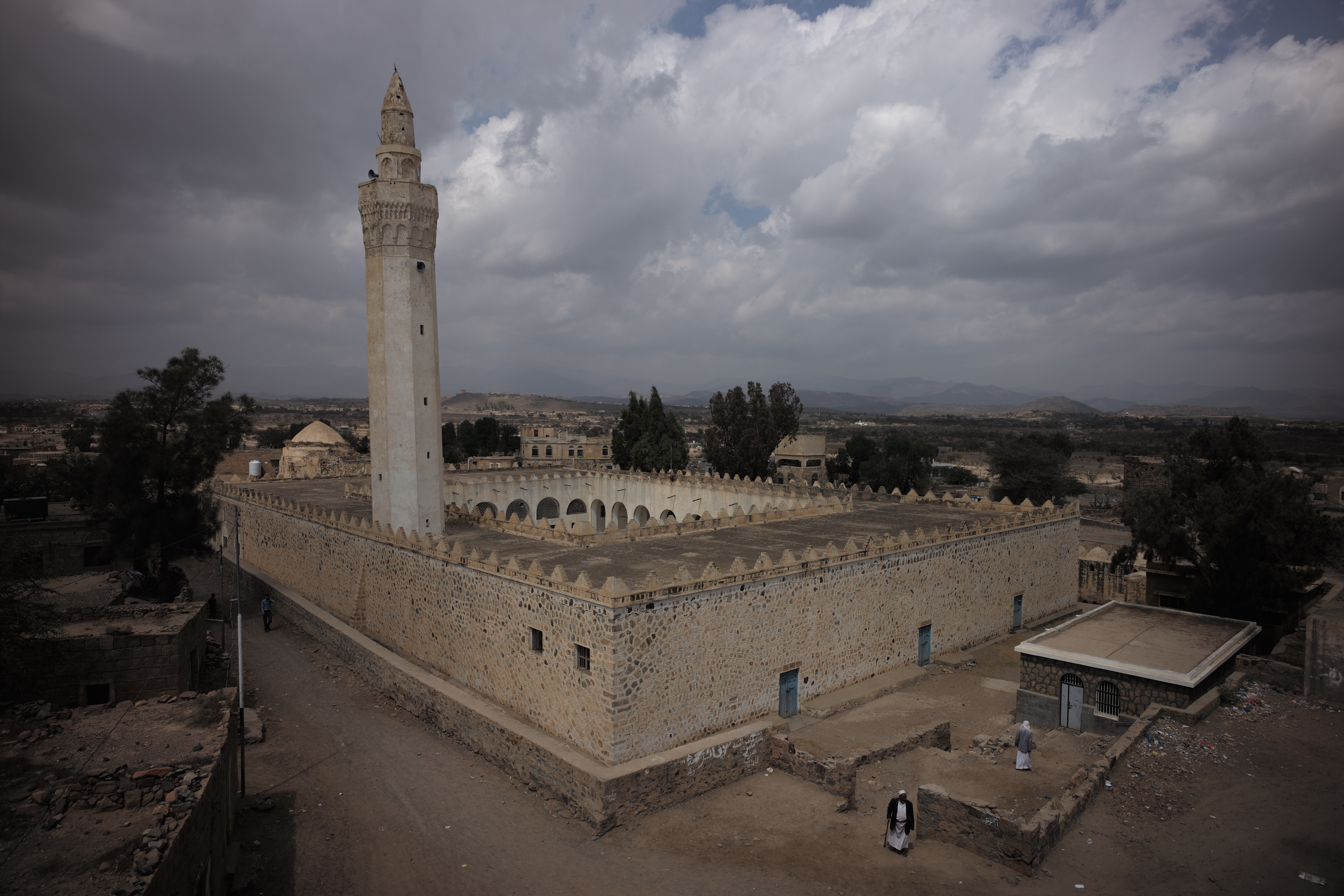 Jennad Mosque